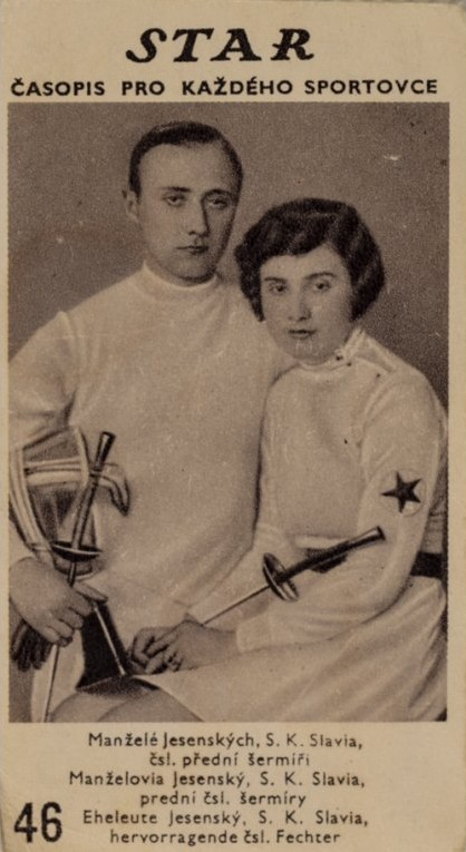 Manželé Jesenští (Žofie a Jiří), čeští šermíři, lékaři a odbojáři